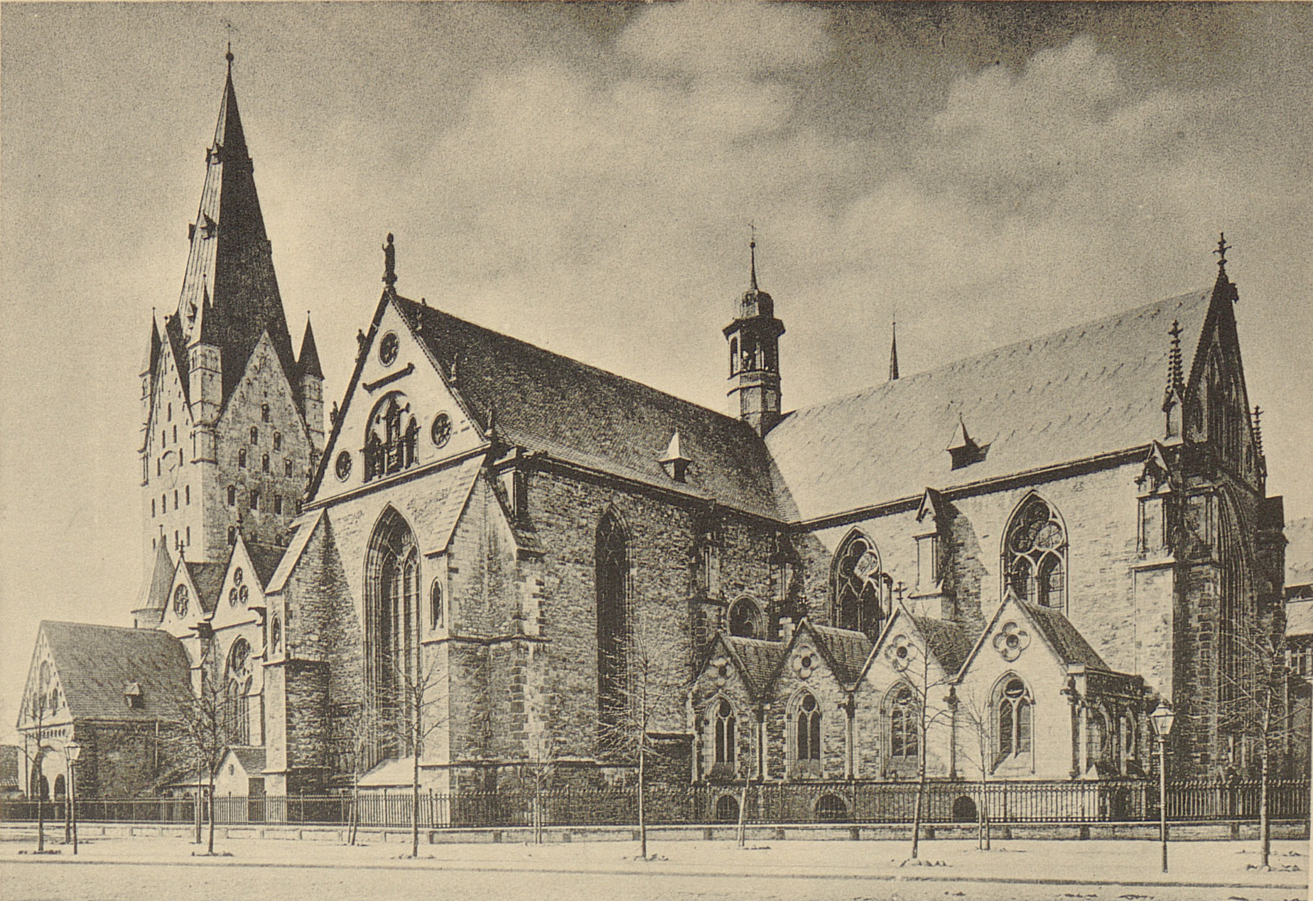 Paderborner Dom, Südostansicht